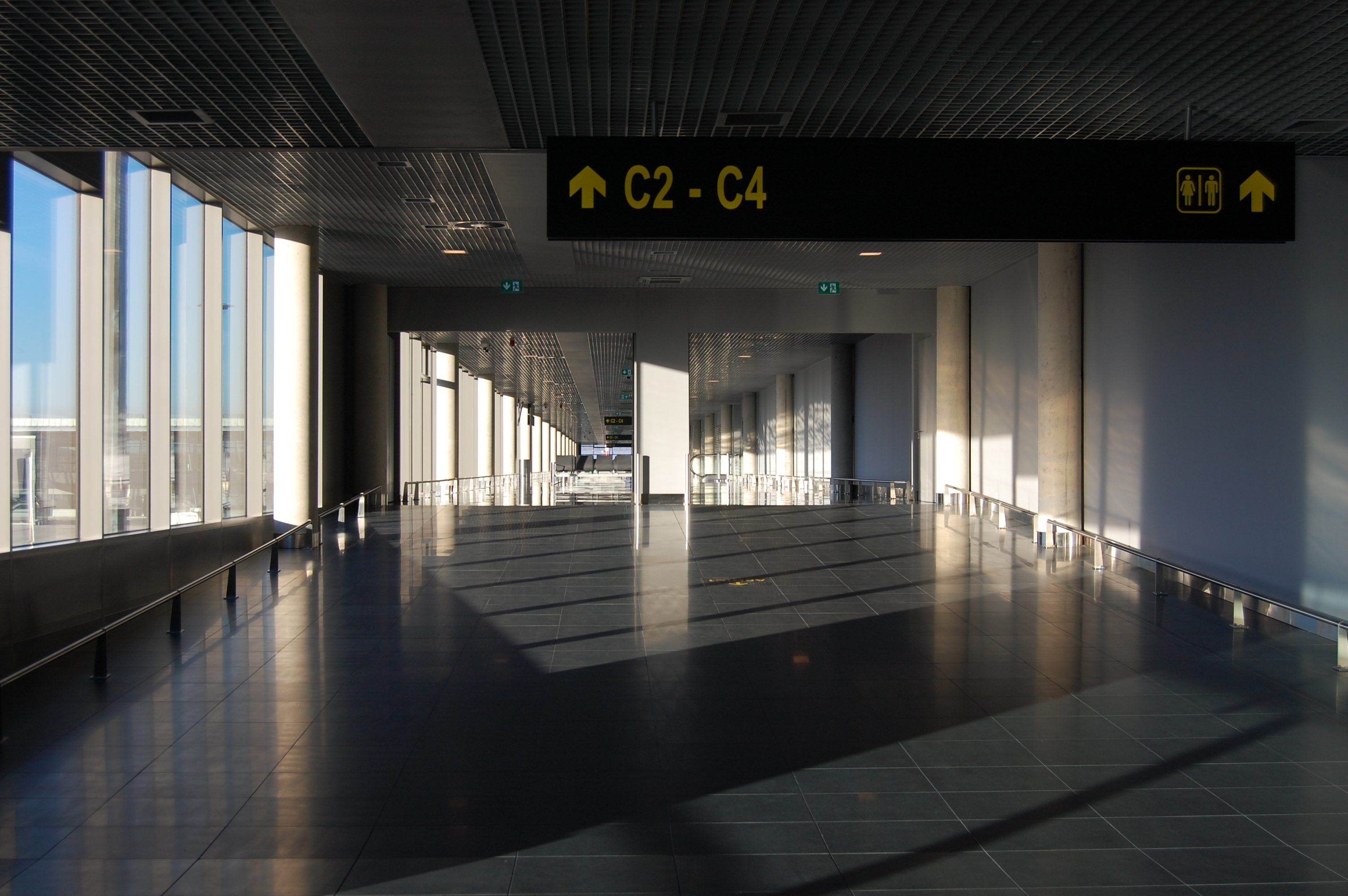 Lētākie lidojumi superbiletes.lv Rīgas lidostas dzīve žurnālistu acīm, 2015.